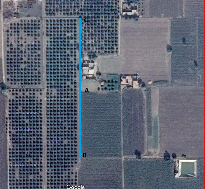 ਪੰਜਾਬੀ: ਨਕਾਲ ਨੂੰ ਦਰਸ਼ਾਉਂਦਾ ਹੋਇਆ ਚਿਤ੍ਰ